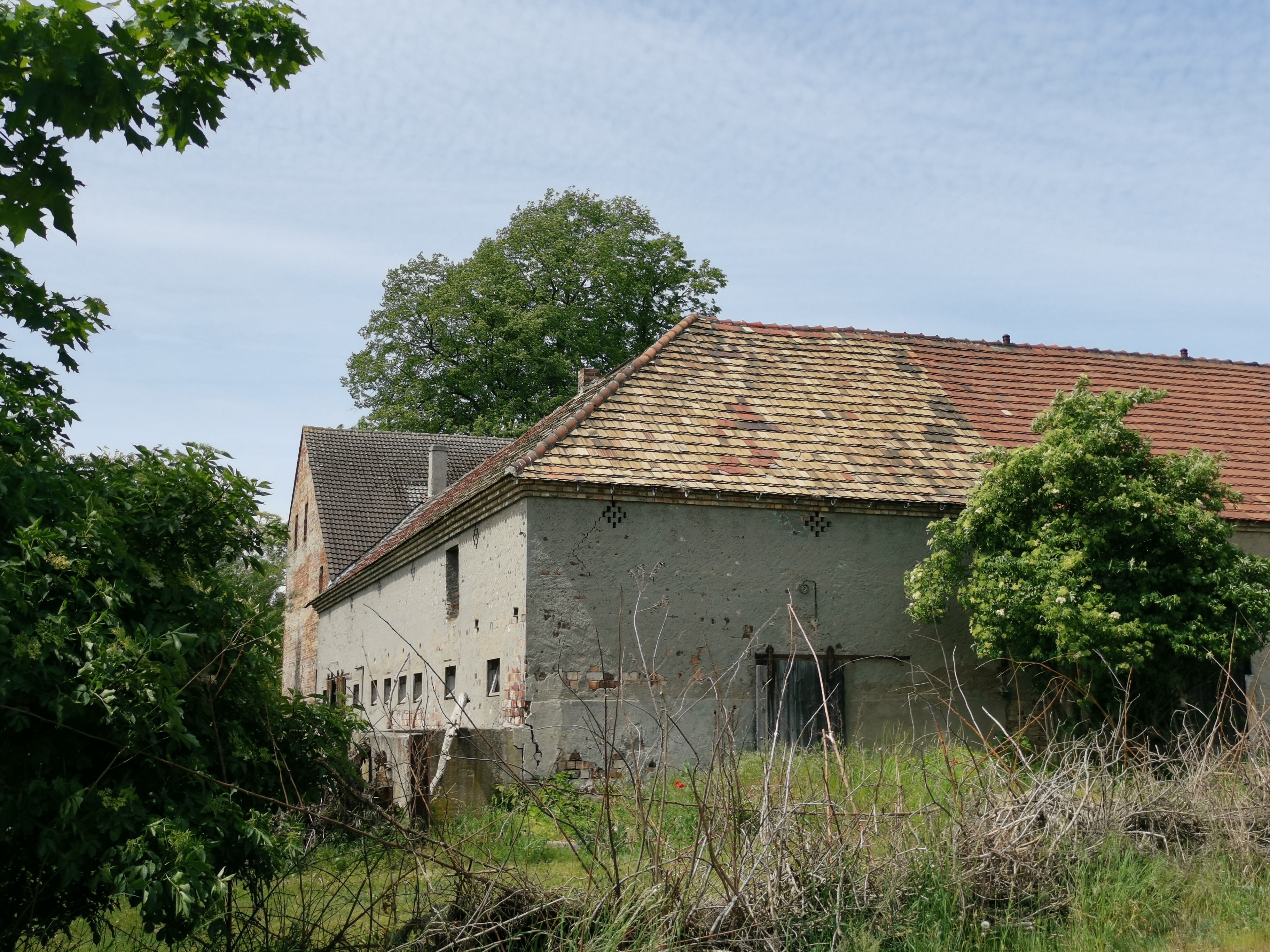 Zwei als Naturdenkmal geschützte Winterlinden am ehemaligen Gasthof in Grünewald